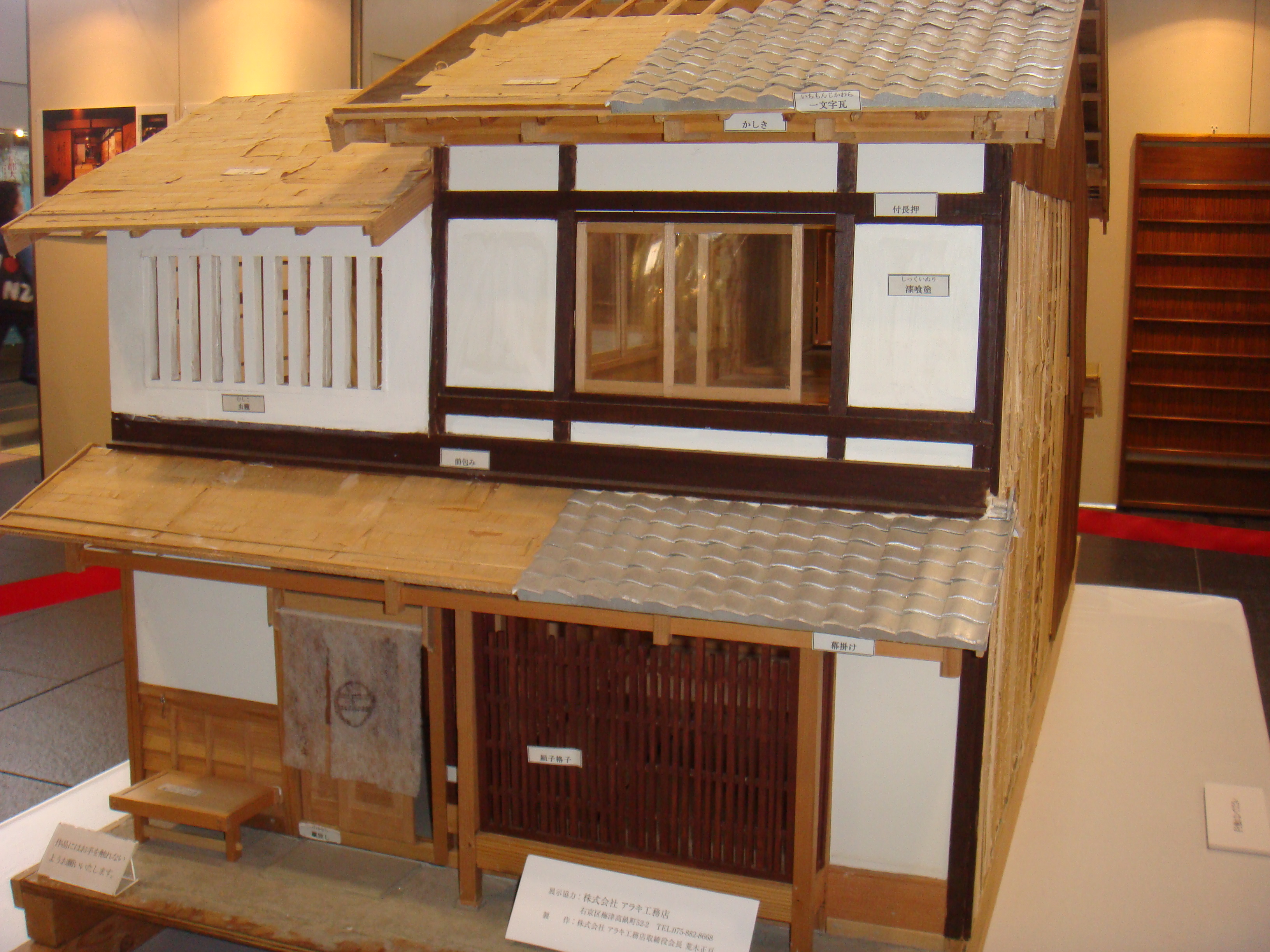 Kyoto